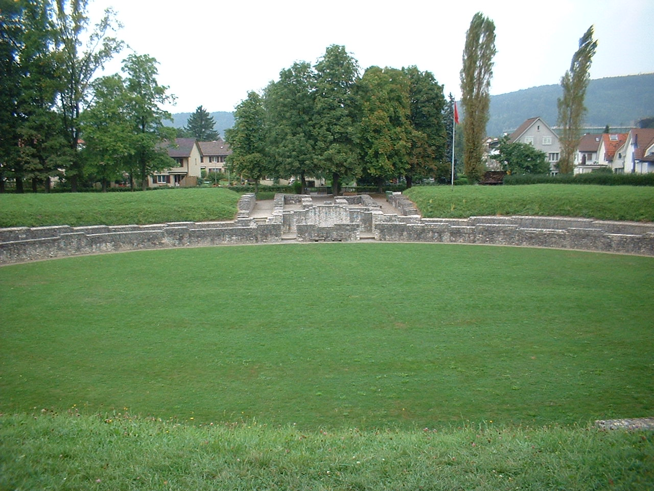 Amphitheater von Vindonissa (Windisch), Schweiz